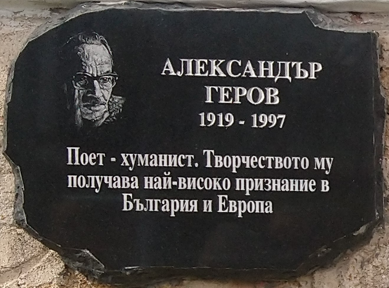 Александър Геров (1919-1997) - плоча в Исторически музей Панагюрище - Надпис: Поет-хуманист. Творчеството му получава най-високо признание в България и Европа